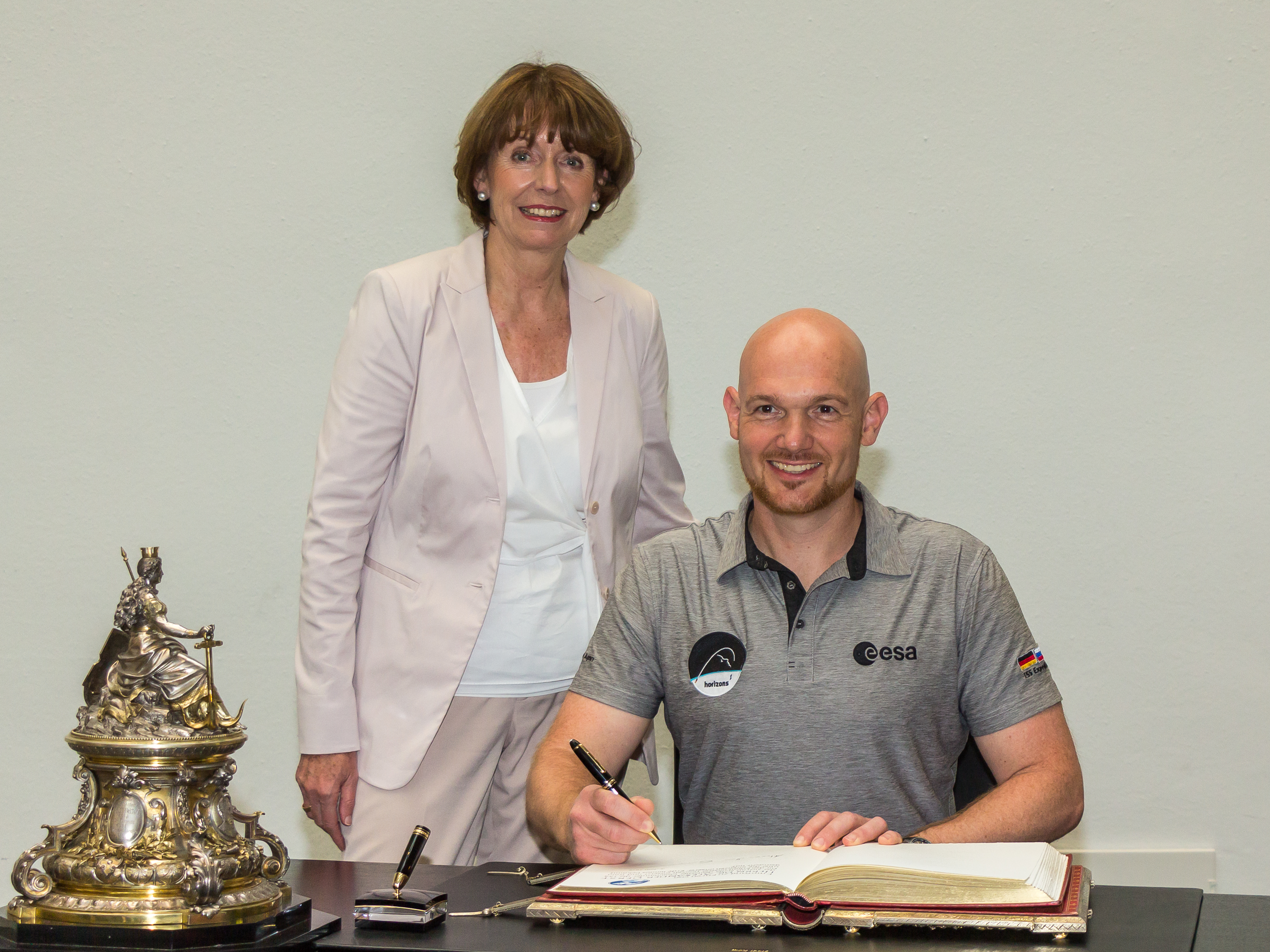 Empfang für Alexander Gerst im Kölner Rathaus Foto: Alexander Gerst hat sich in das Gästebuch der Stadt Köln eingetragen. Links Henriette Reker, Oberbürgermeisterin von Köln. Auf dem Tisch links ein Trinkpokal Willkomm